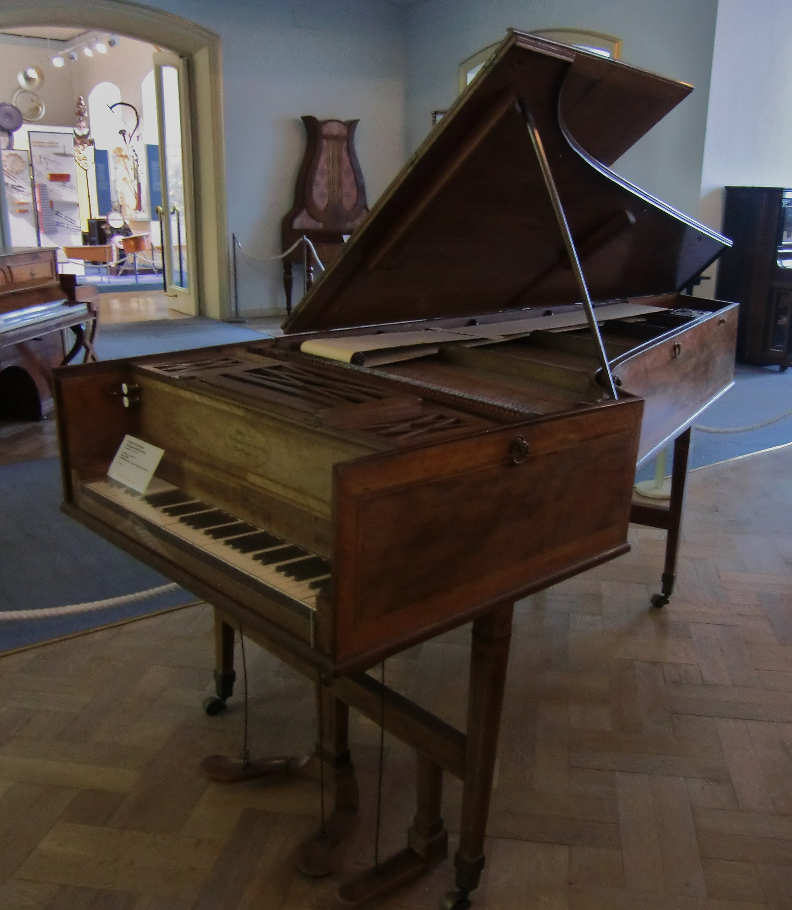 Combiné "clavecin-piano" par Joseph Merlin (Londres, 1780) - Munich, Deutsches Museum